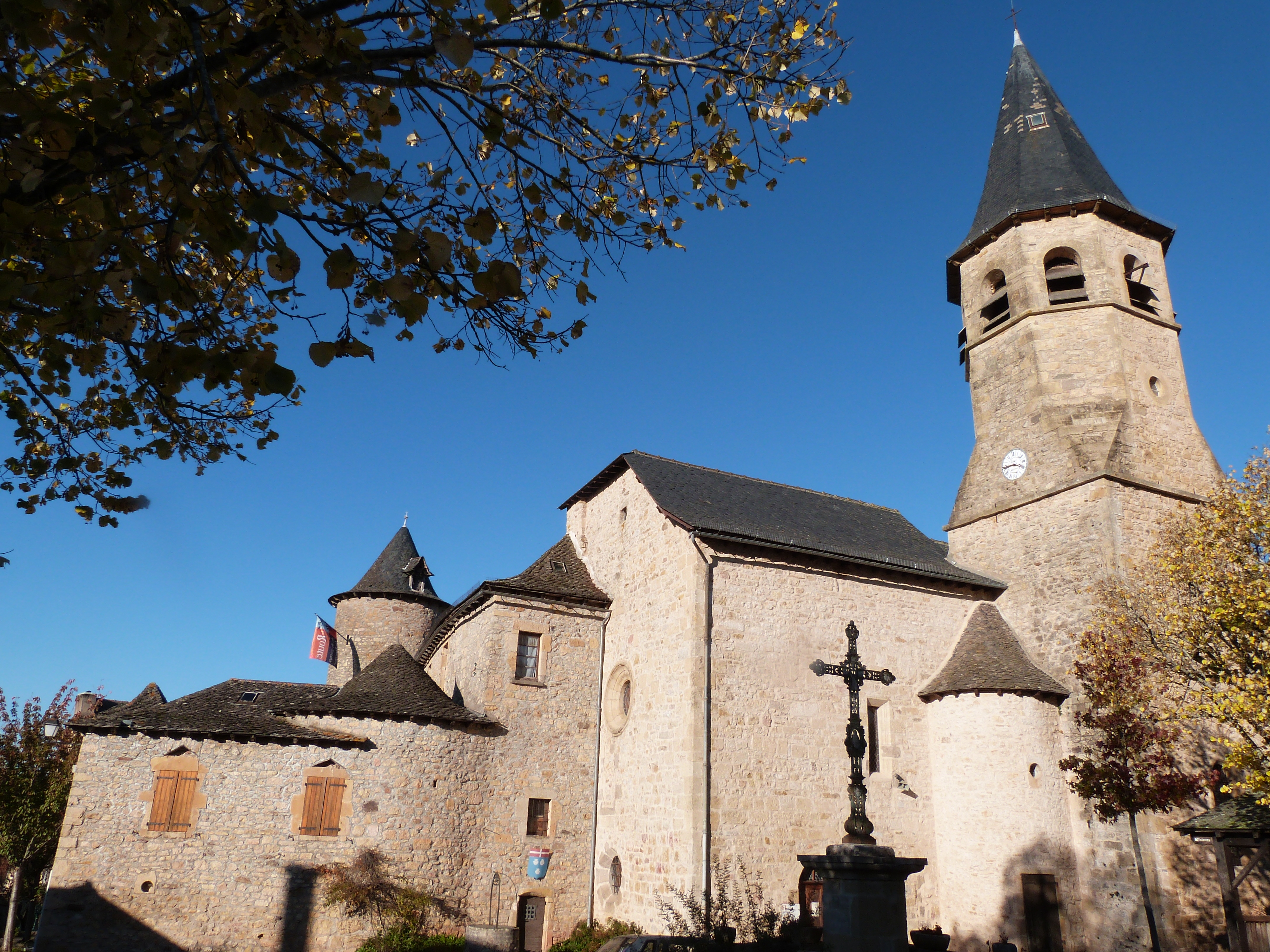 une église a été accolée au bâtiment de la commanderie formant le front ouest de l'ensemble